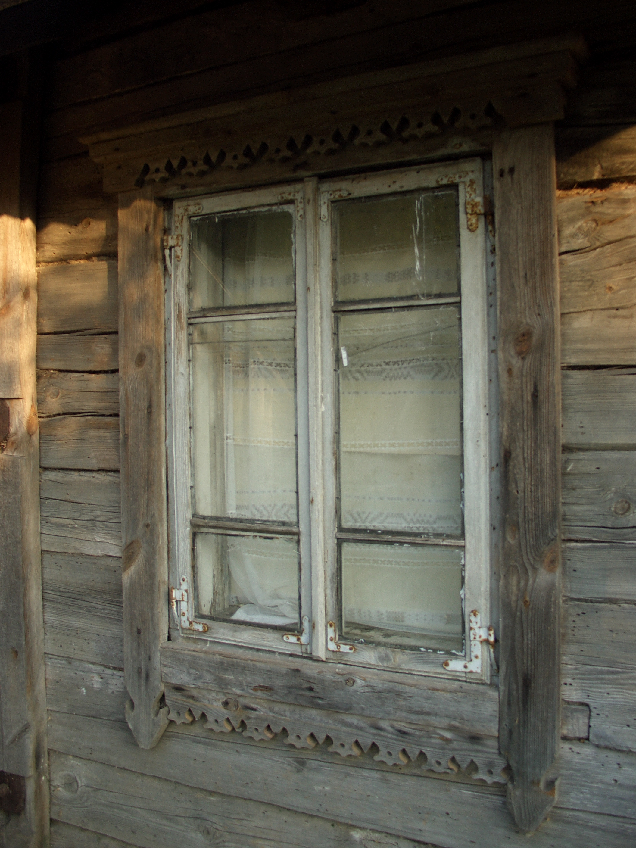 Langas